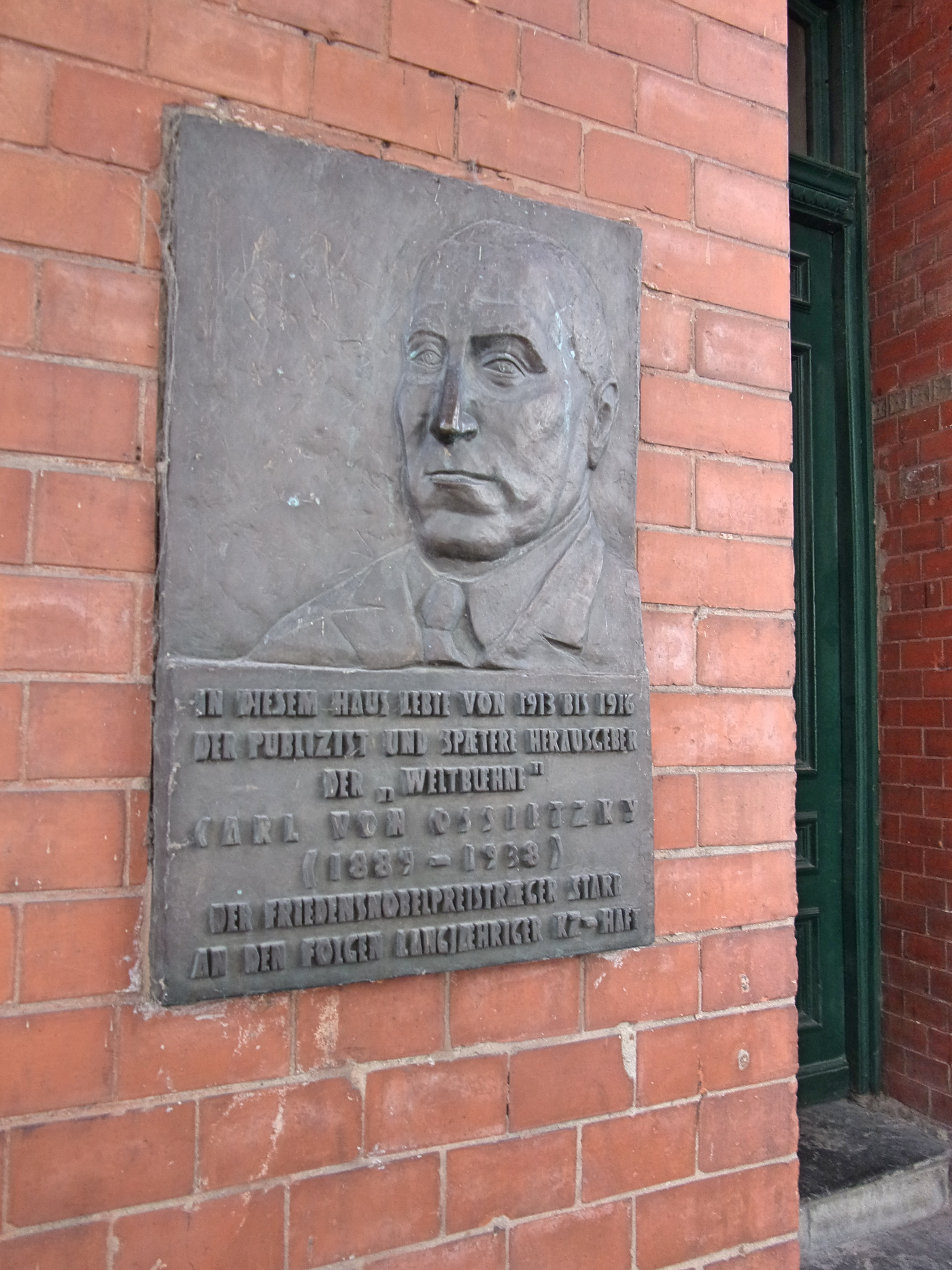 Tafel mit Portait des Carl von Ossietzky am Wohnhaus Schmilinskystraße 6 in Hamburg-St. Georg. Der Friedensnobelpreisträger lebte in dem Haus von 1913-1916, er starb 1938 in Berlin an den Folgen langjähriger KZ-Haft. Abschrift der Tafel: In diesem Haus lebte von 1913-1916 der Publizist und spätere Herausgeber der „Weltbühne“ Carl von Ossietzky (1889-1938). Der Friedensnobelpreisträger starb an den Folgen langjaehriger KZ-Haft.